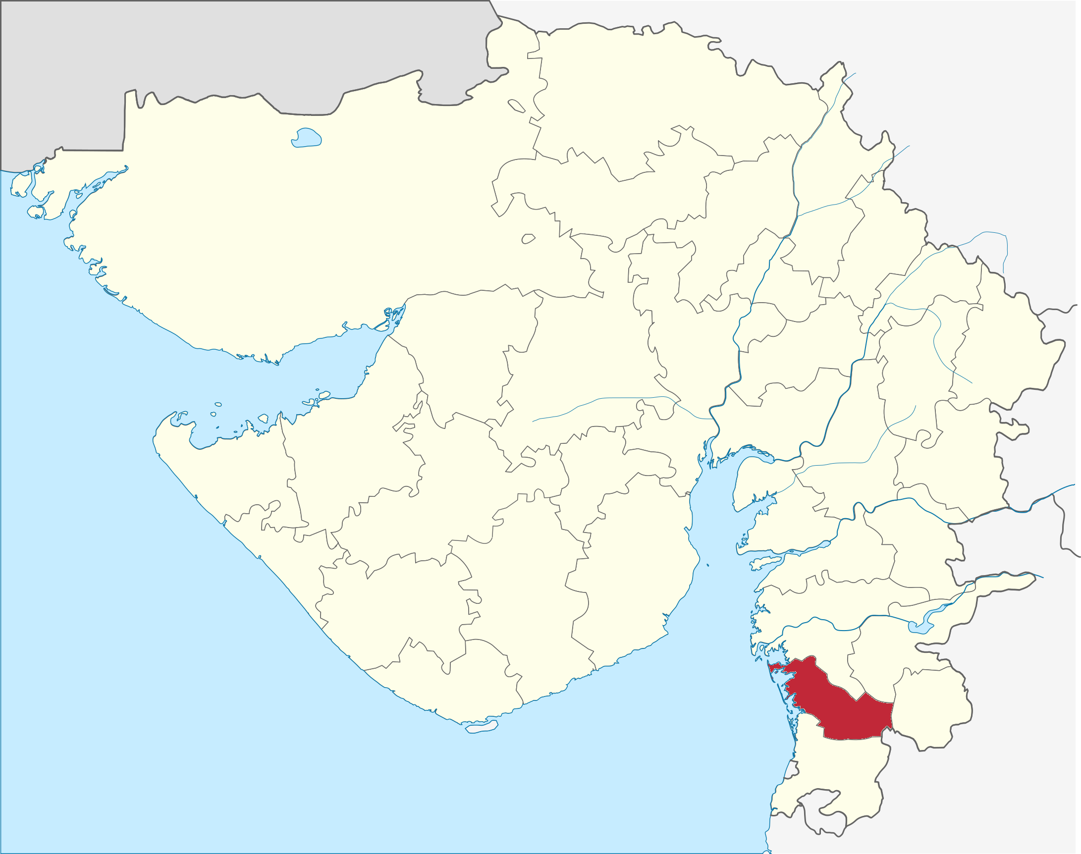 Distrito de Navsari en Gujarat